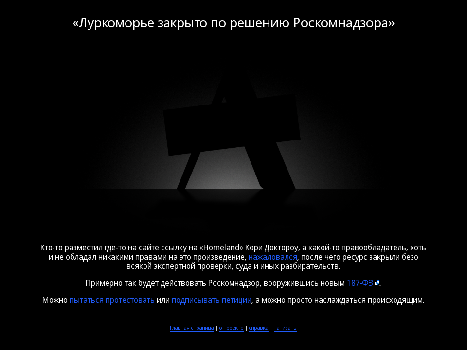 Скриншот заглушки сайта «Луркоморье», демонстрировавшейся 1 августа 2013 года в протест принятия 187-ФЗ.